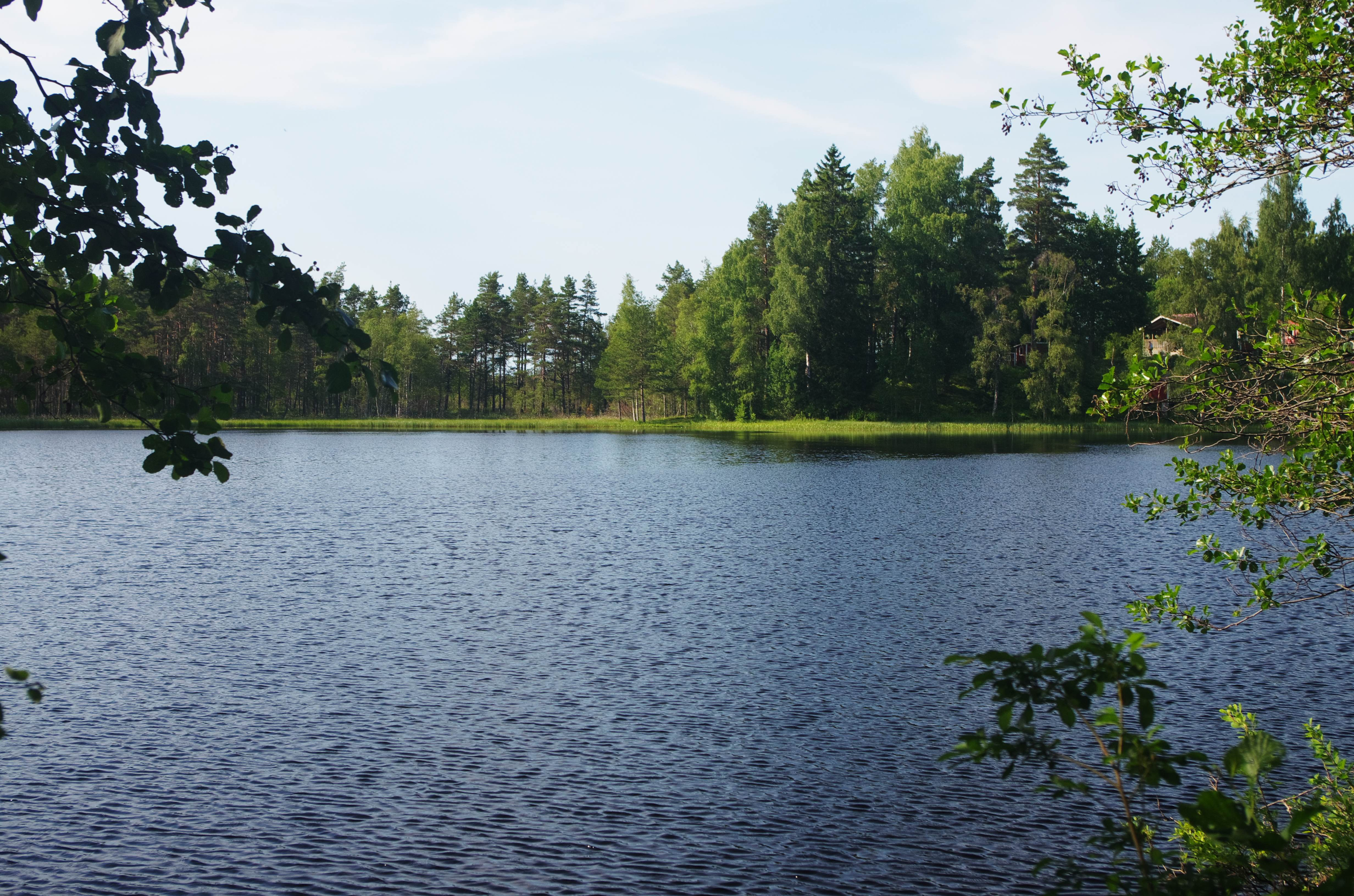 Sjöbackasjön i Mullsjö kommun i Västergötland i Sverige.